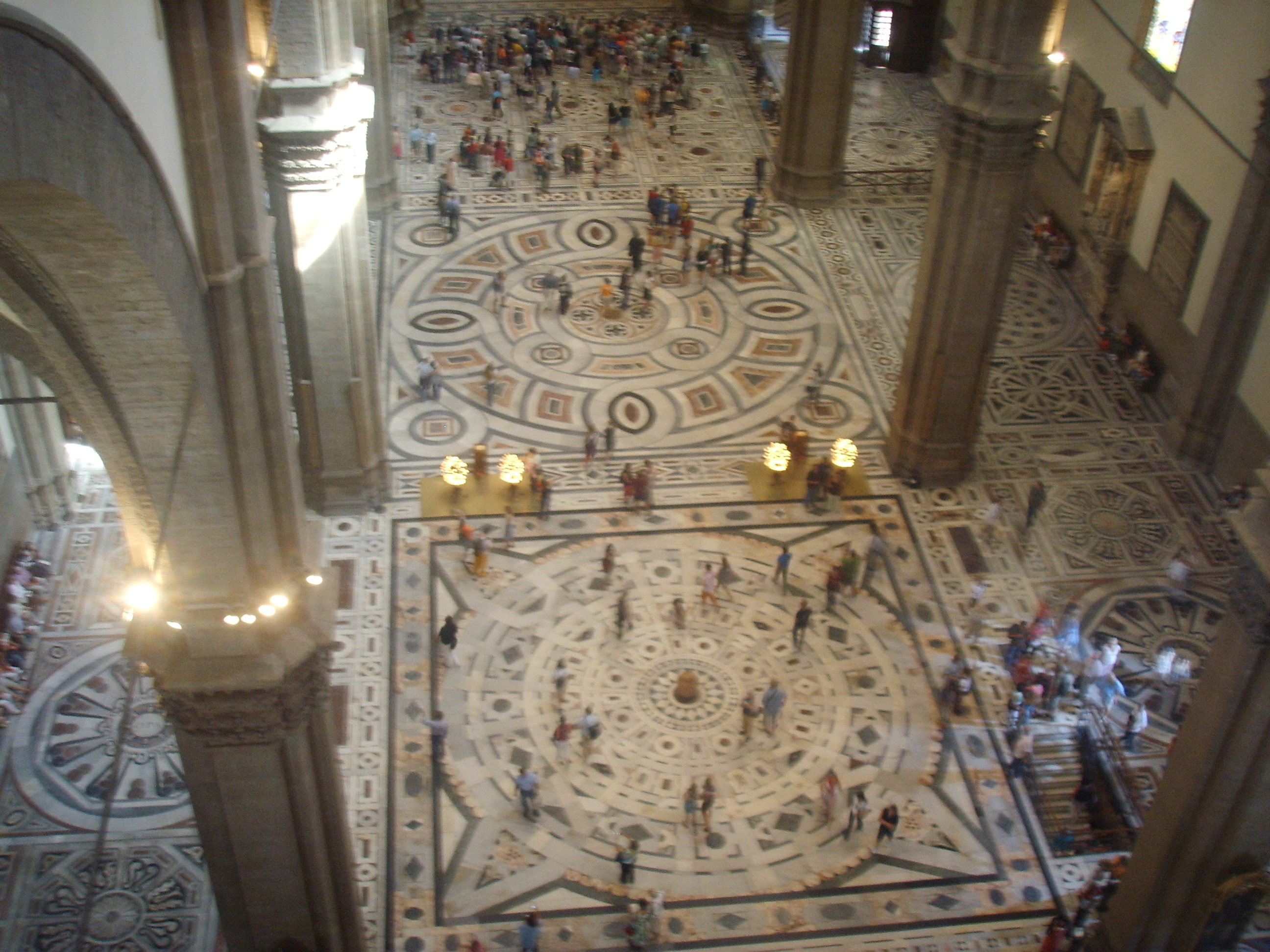 Pavimento di Santa Maria del Fiore a Firenze.